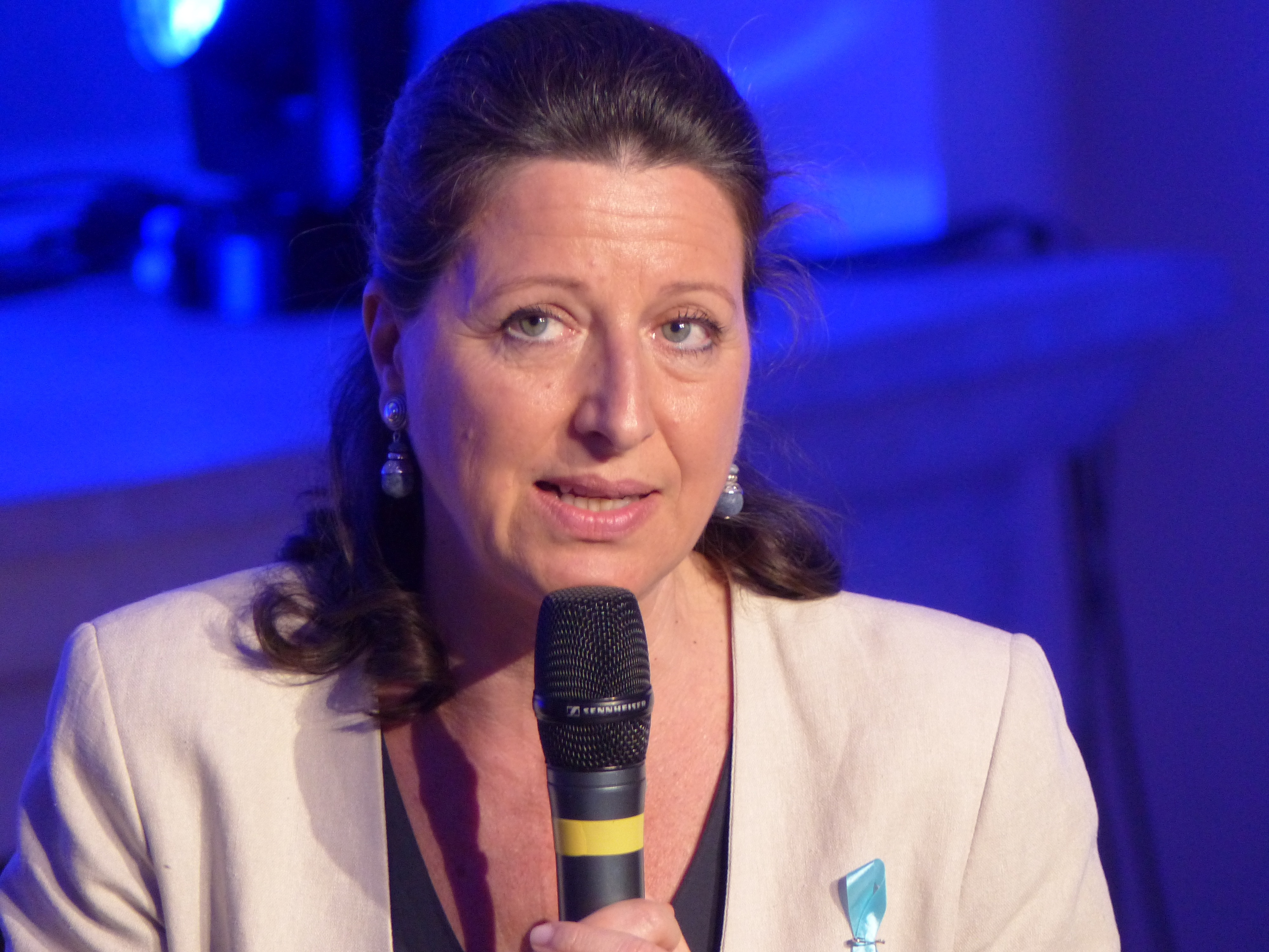 Agnès Buzyn, ministre des Solidarités et de la Santé, lors du lancement du 4e plan autisme (ou stratégie autisme) le 6 avril 2018.